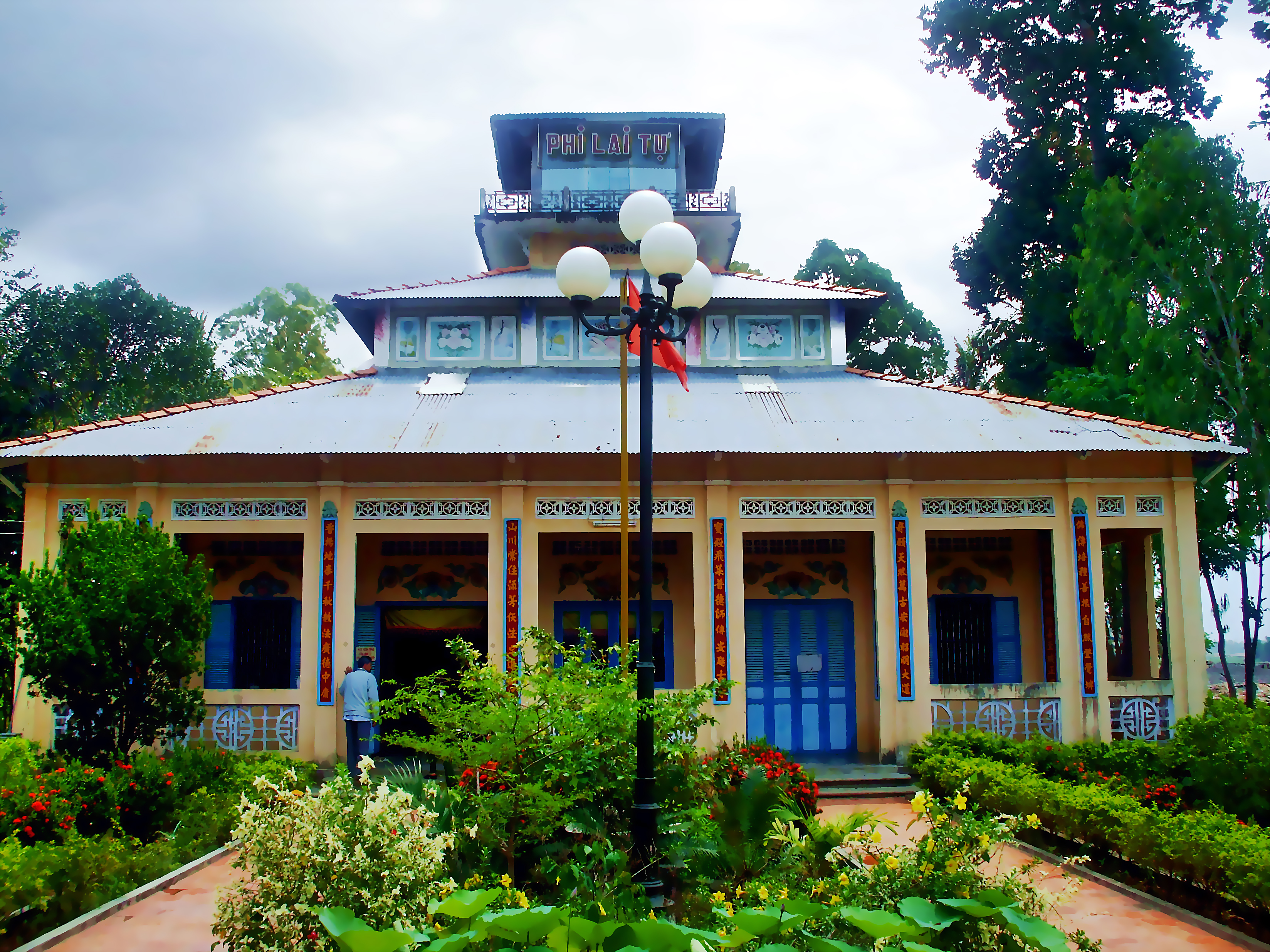 Chùa Phi Lai ở thị trấn Ba Chúc (Tri Tôn, An Giang, Việt Nam). Khi xảy ra thảm sát Ba Chúc năm 1978, nhiều người dân Việt đã bị quân Pol Pot giết chết khi trốn trong chùa.